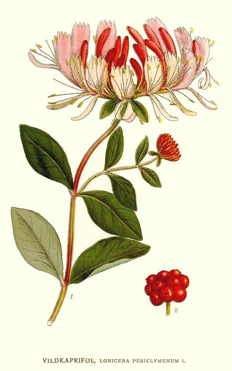 Original Description Vildkaprifol, Lonicera periclymenum L.